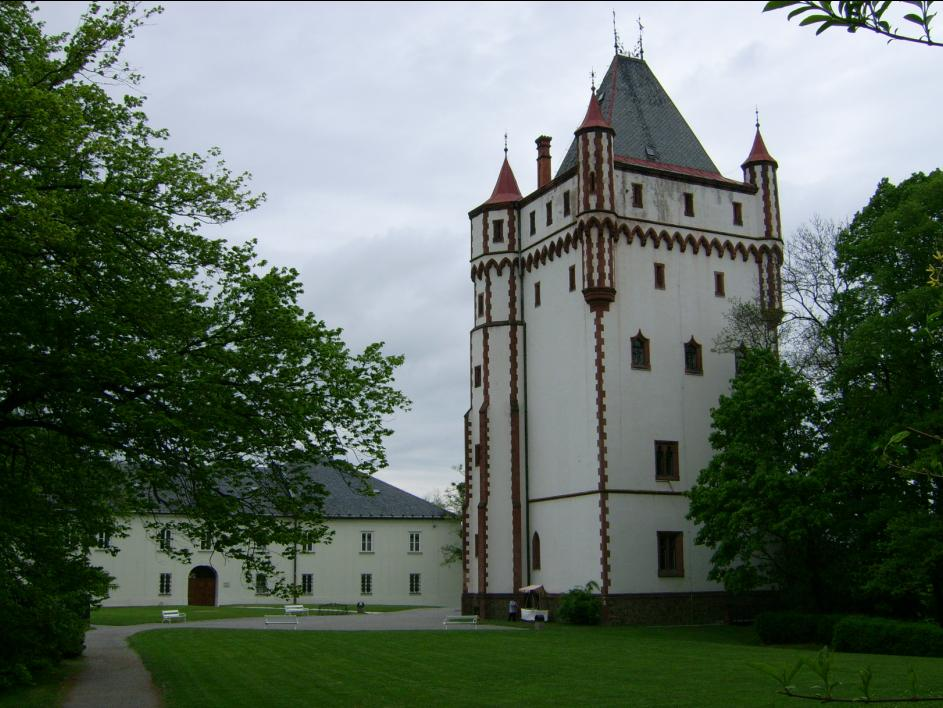 Bílý zámek v Hradci n. Moravicí u Opavy